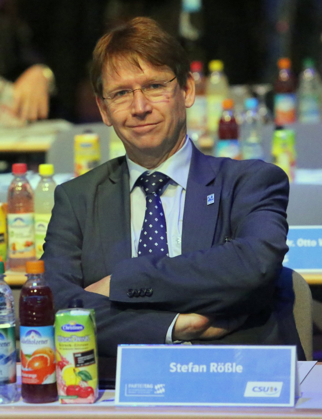 Stefan Rößle, deutscher Politiker (CSU), Mitglied im Parteivorstand der CSU, Landesvorsitzender der Kommunalpolitischen Vereinigung Bayern (KPV) und seit 2002 Landrat des Landkreises Donau-Ries. Hier während des CSU-Parteitags in München am 21.11.2015. Titel des Werks: "Stefan Rößle - deutscher Politiker (CSU) - während des CSU-Parteitags in München am 21.11.2015"